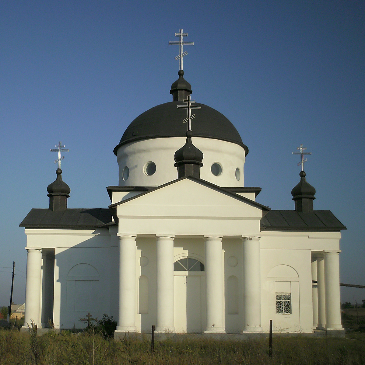 Свято-Георгиевская Константиновский район Донецкой области